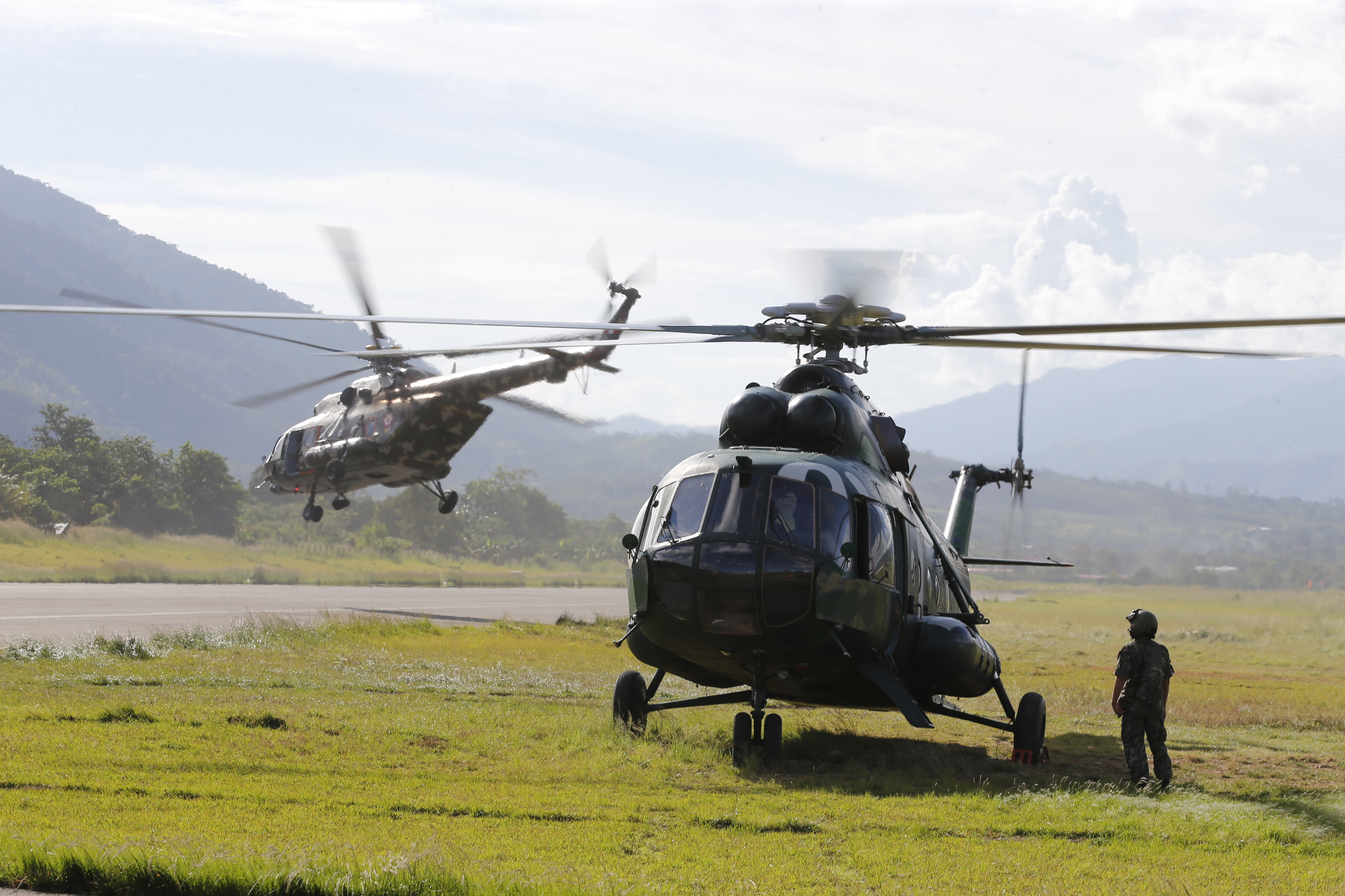 MINISTRO DE DEFENSA JAKKE VALAKIVI SUPERVISÓ BASES CONTRATERRORISTAS EN EL VRAEM